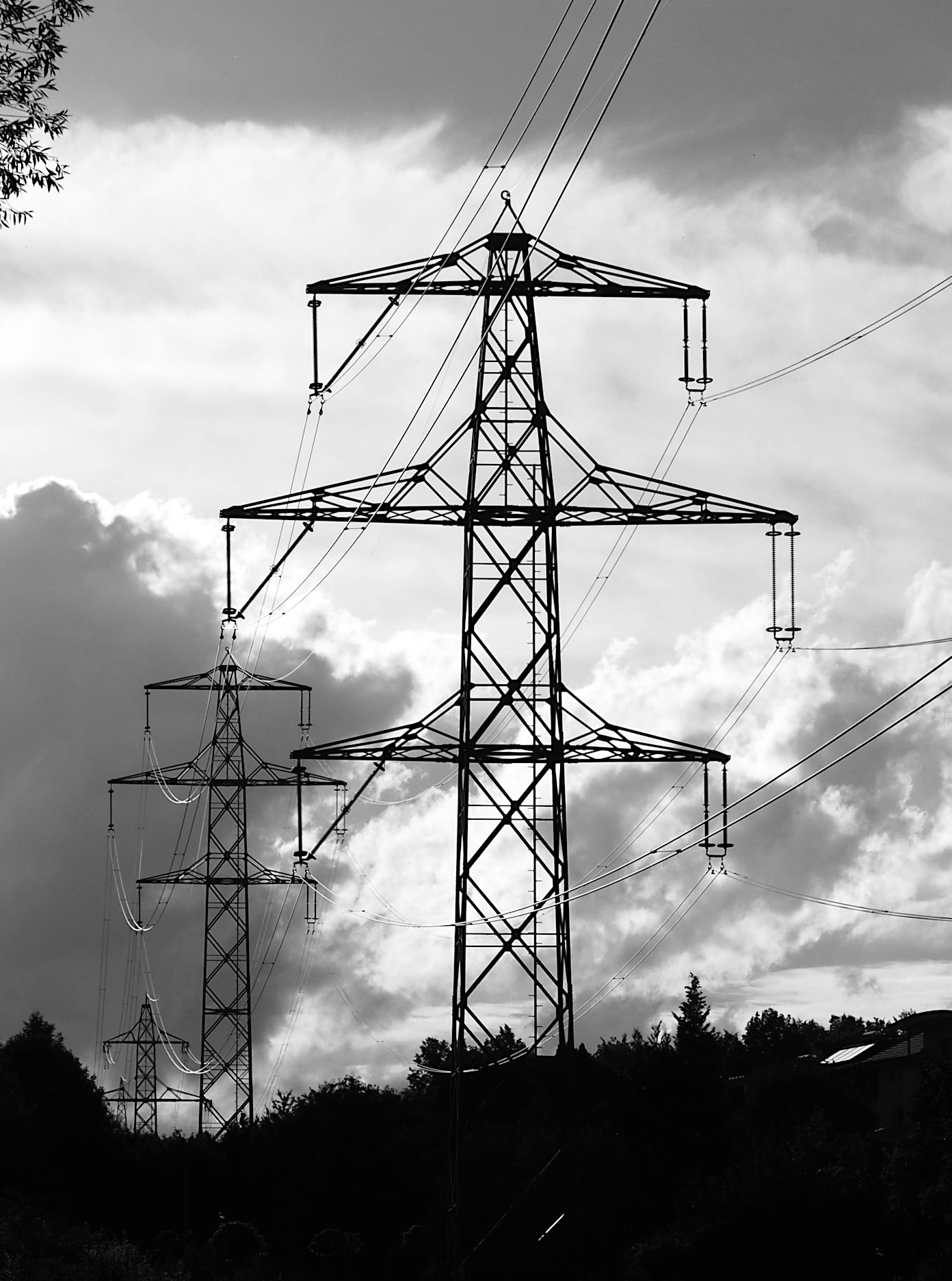 unsymmetrische Höchstspannungsmasten